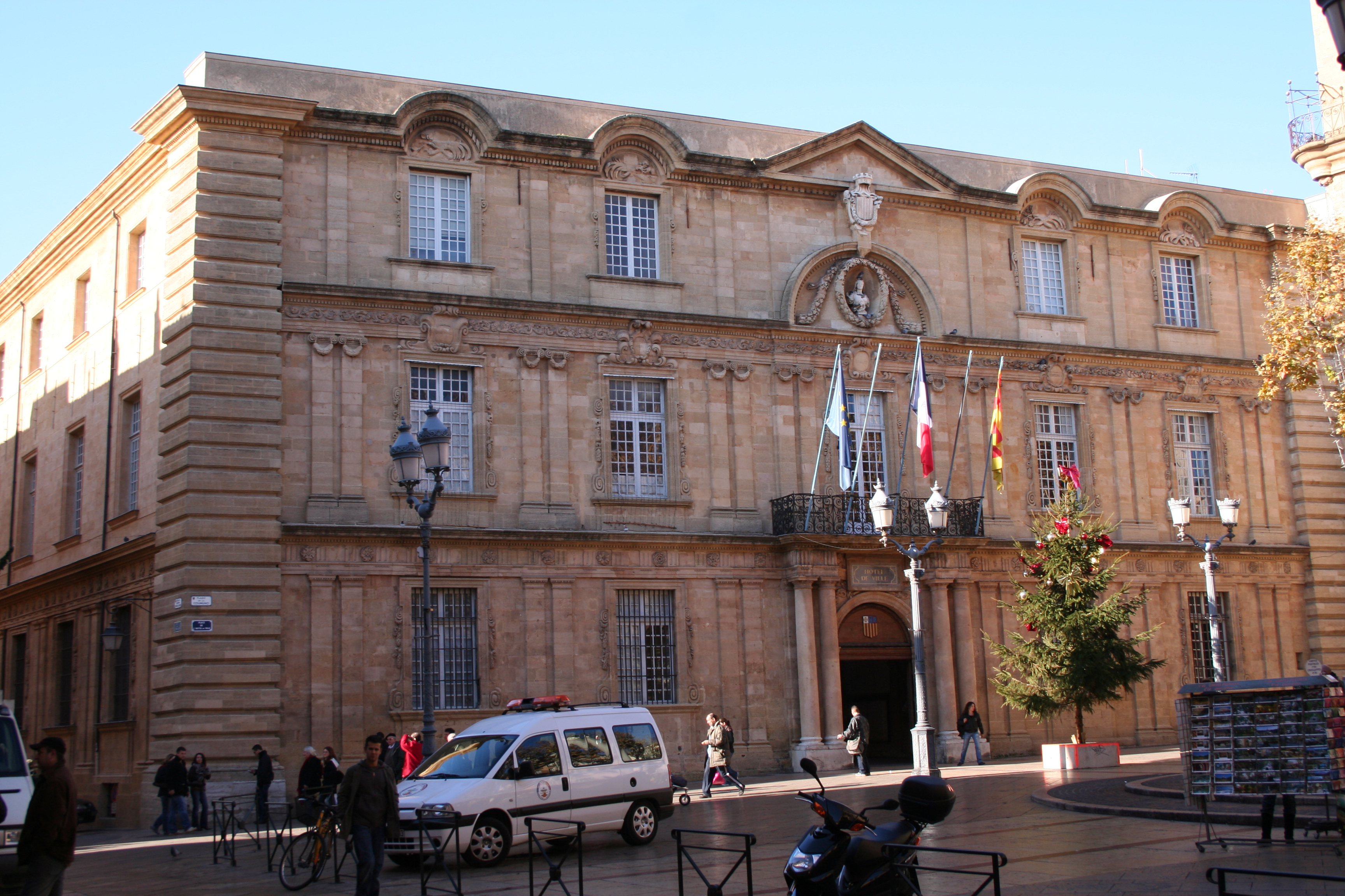 Hôtel de ville, Aix-en-Provence (France).